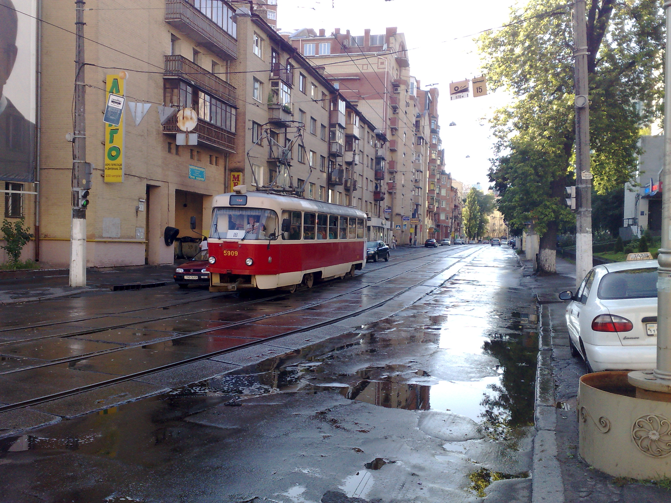 Трамвай Татра-Т3 № 5909 прошедший КВР